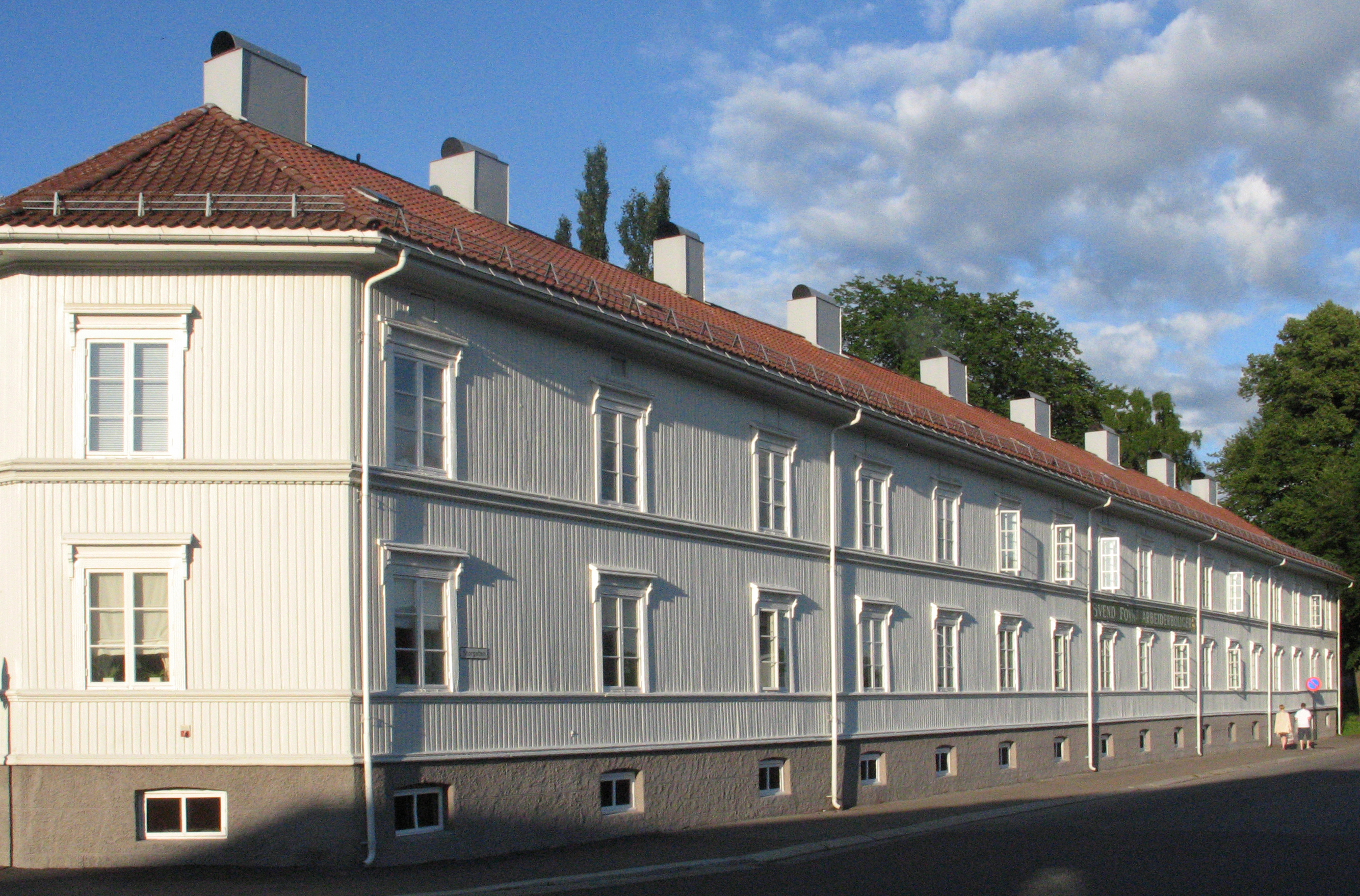 Svend Foyns arbeiderboliger i Tønsberg